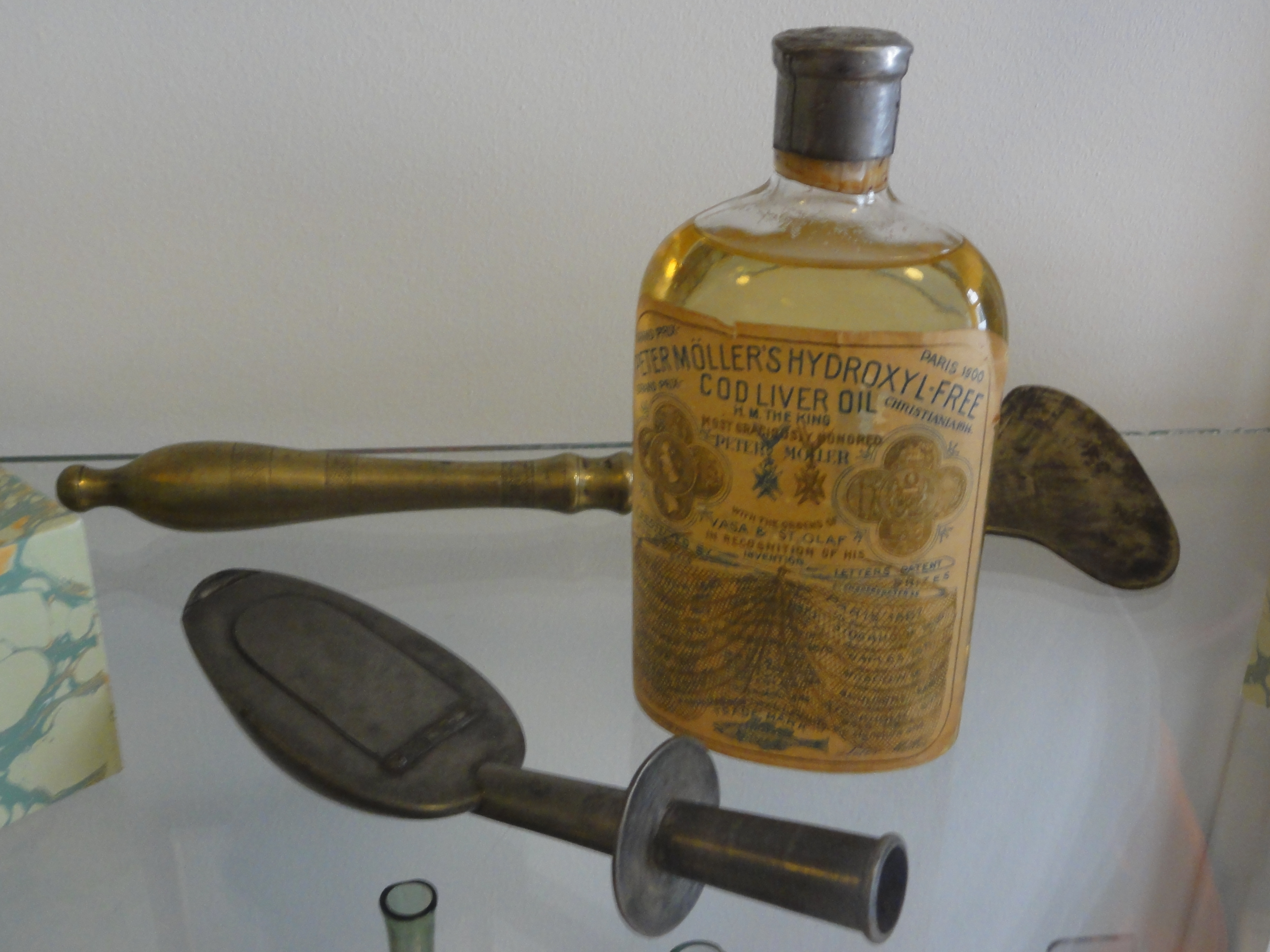 Basel — Pharmazie-Historisches Museum